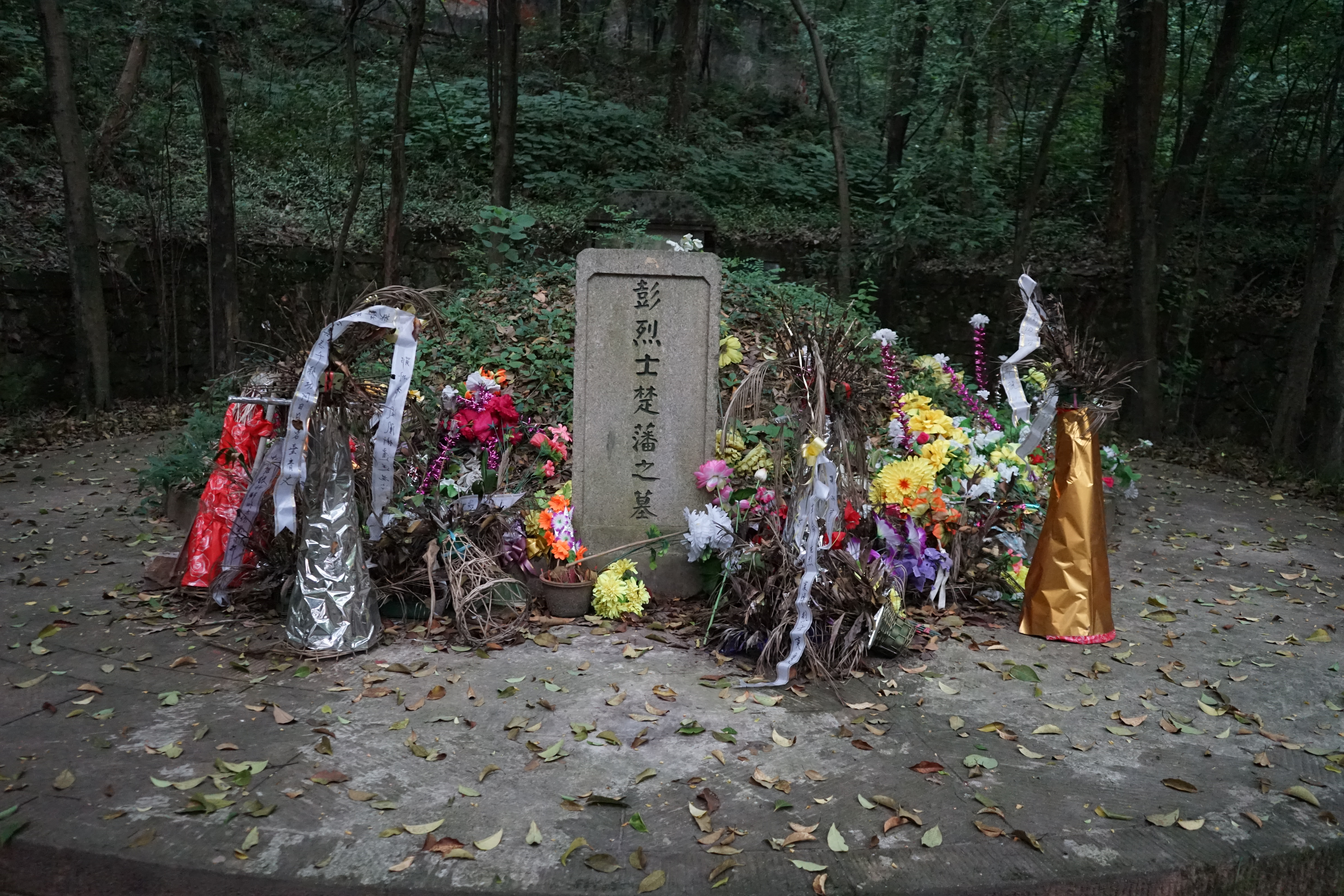 中文（中国大陆）: 彭楚藩烈士墓。第一批湖北省文物保护单位。1911年10月9日，彭与蒋翊武商议革命，当晚十时被捕，次日凌晨被斩首。武昌起义后革命党人将其首级和身躯缝合后安葬。